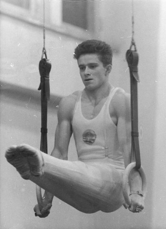 Siegfried Fülle Zentralbild Dressel-Studré 18.12.1960 Männer kämpften um den FDGB-Pokal Am Sonnabend, dem 17.12.1960, traf sich die Spitzenklasse unserer Turner im Wettkampf um den FDGB-Pokal im Dynamo-Sportforum in Berlin-Hohenschönhausen. Den Pokal errang die Mannschaft des SC Lok SC DHLK aus Leipzig. UBz: Der Leipziger Siegfried Fülle machte eine ausgezeichnete Figur in den Ringen.